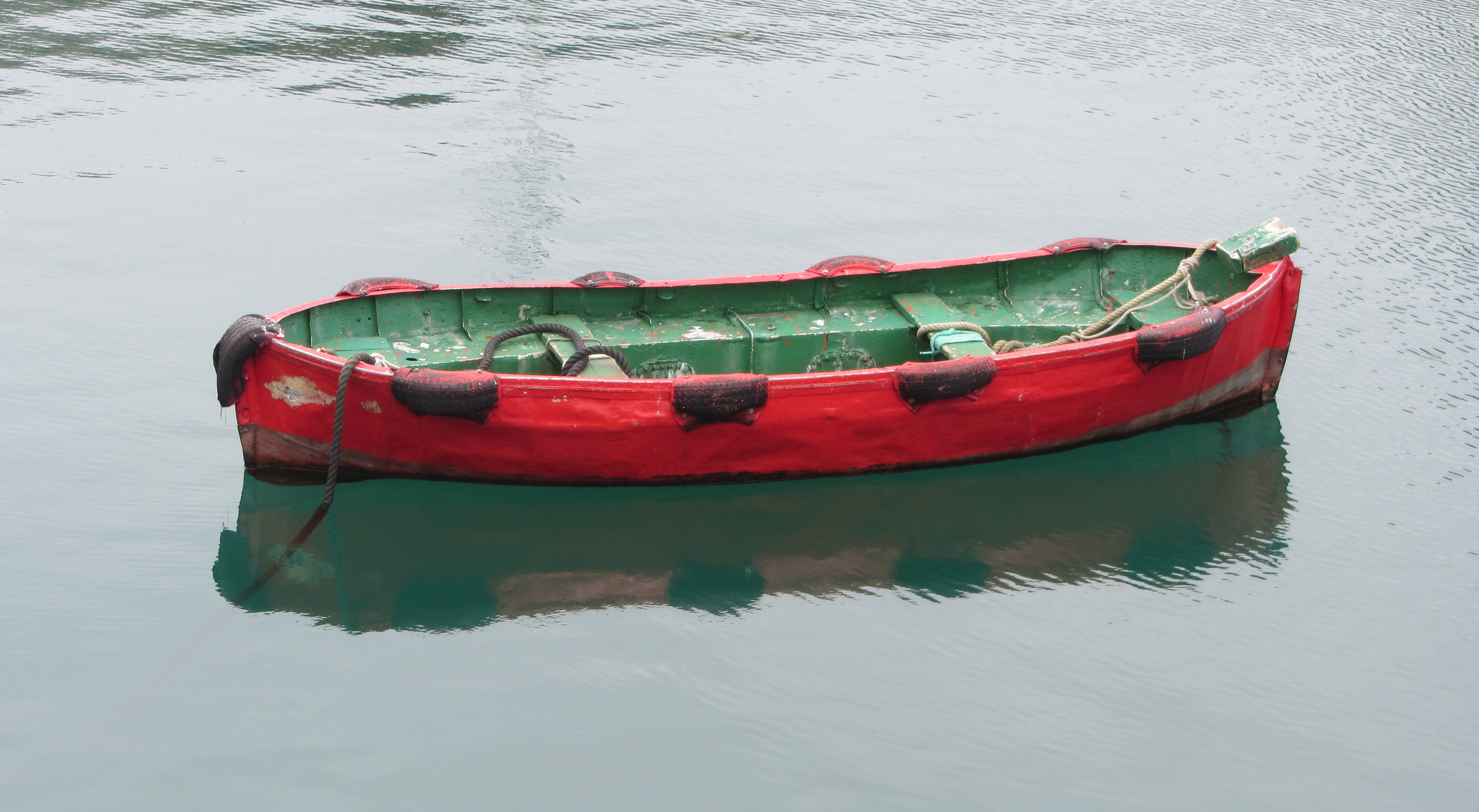 Barca en el puerto de Guetaria (Guipúzcoa - España).